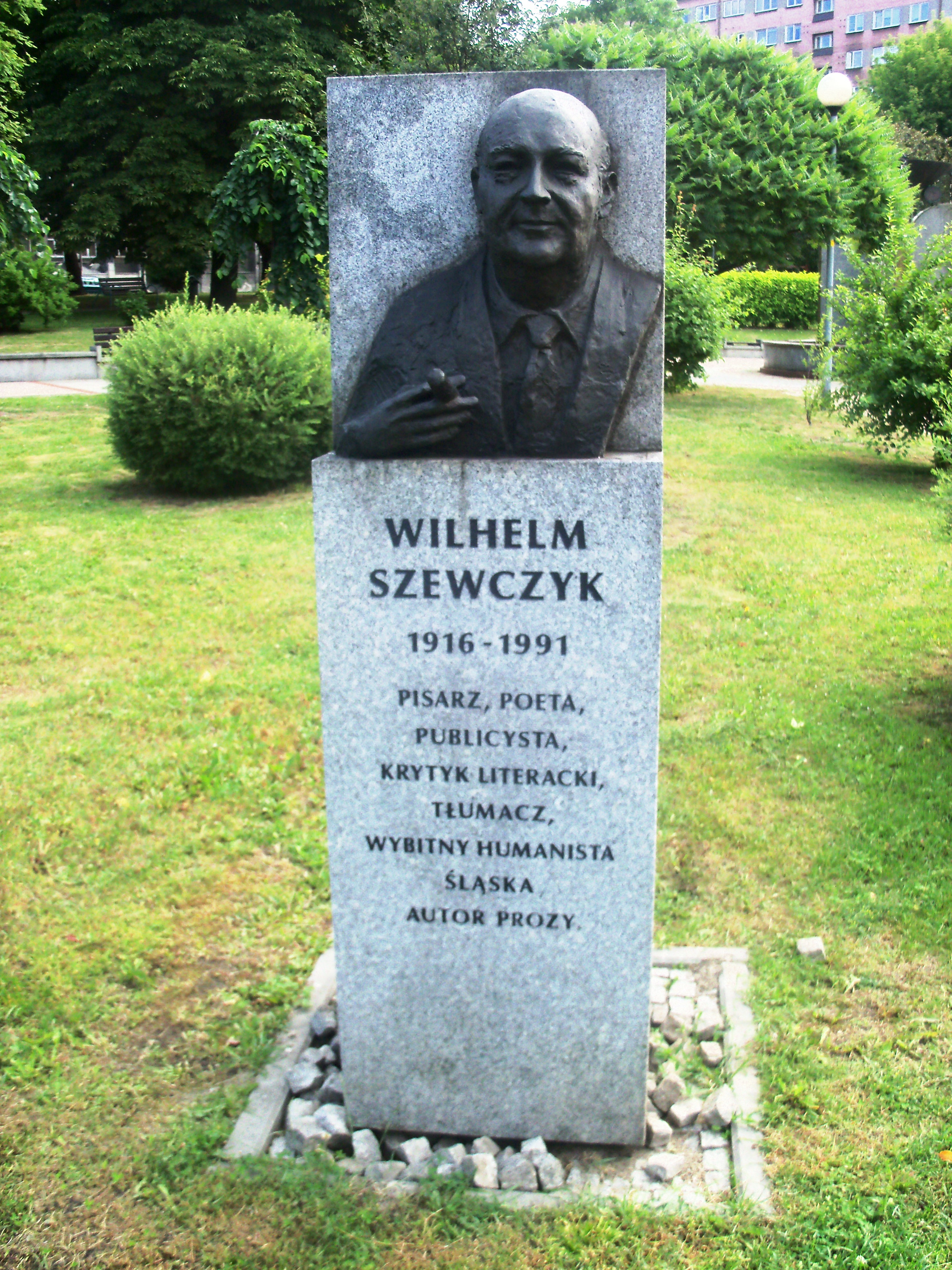 Galeria Artystyczna na placu Grunwaldzkim w Katowicach: Rzeźba przedstawiająca Wilhelma Szewczyka